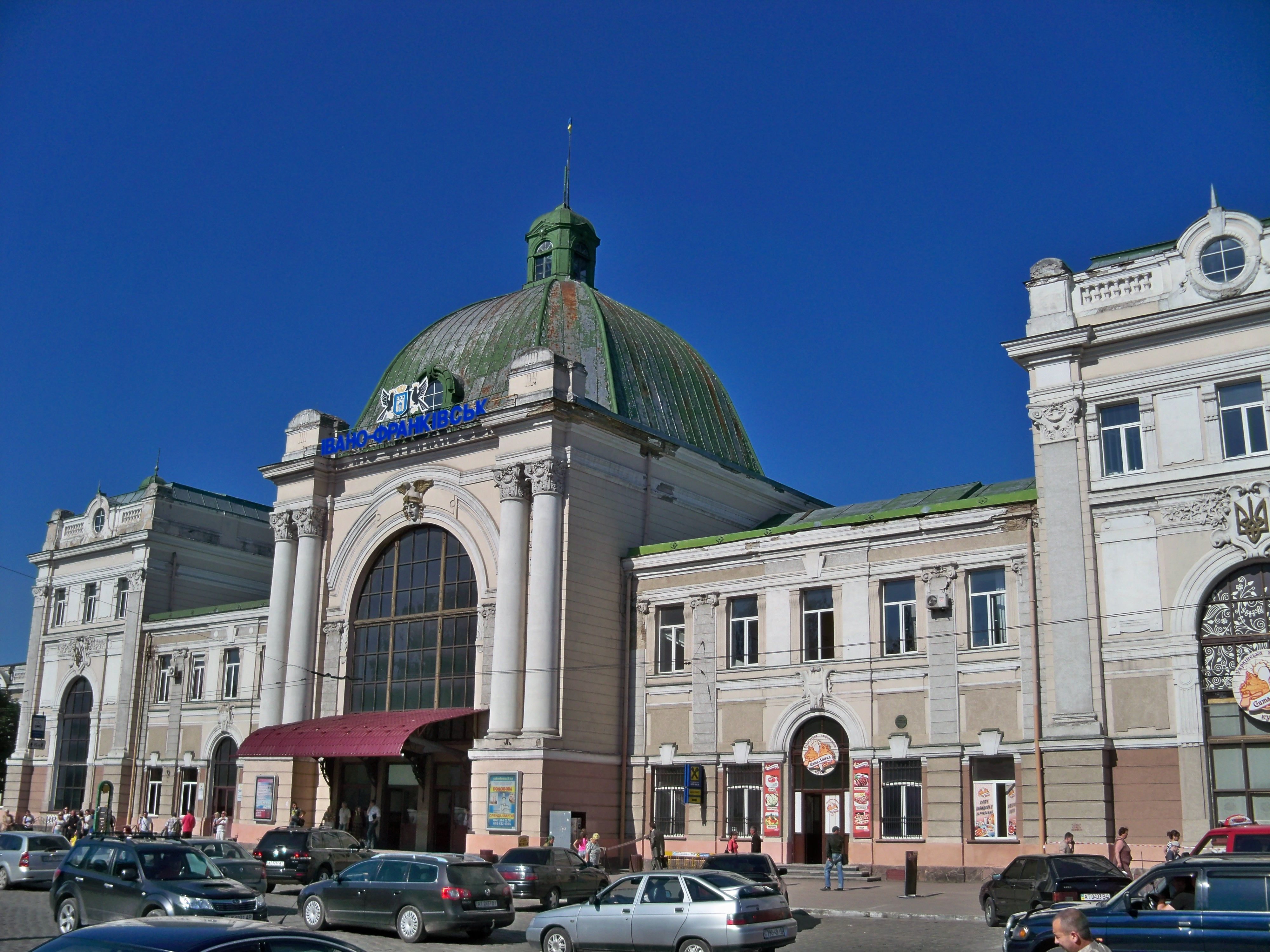 Залізничний вокзал (мур.), Івано-Франківськ, Площа Привокзальна, 8